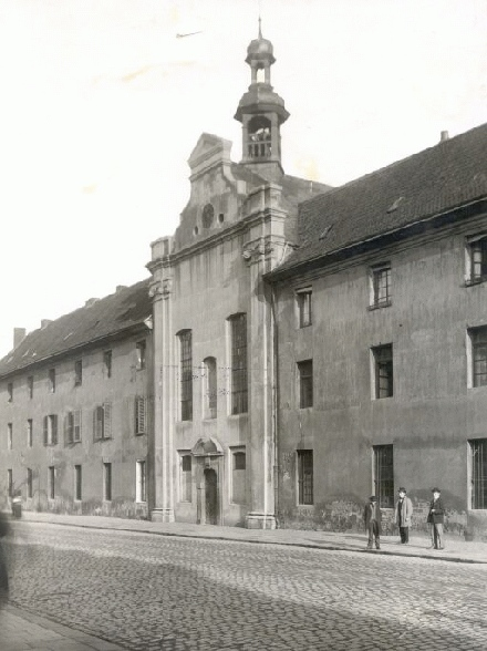 Garnisonskirche Düsseldorf, erbaut 1735 von Ingenieur Carnon, abgebrochen um 1898, außen.jpg